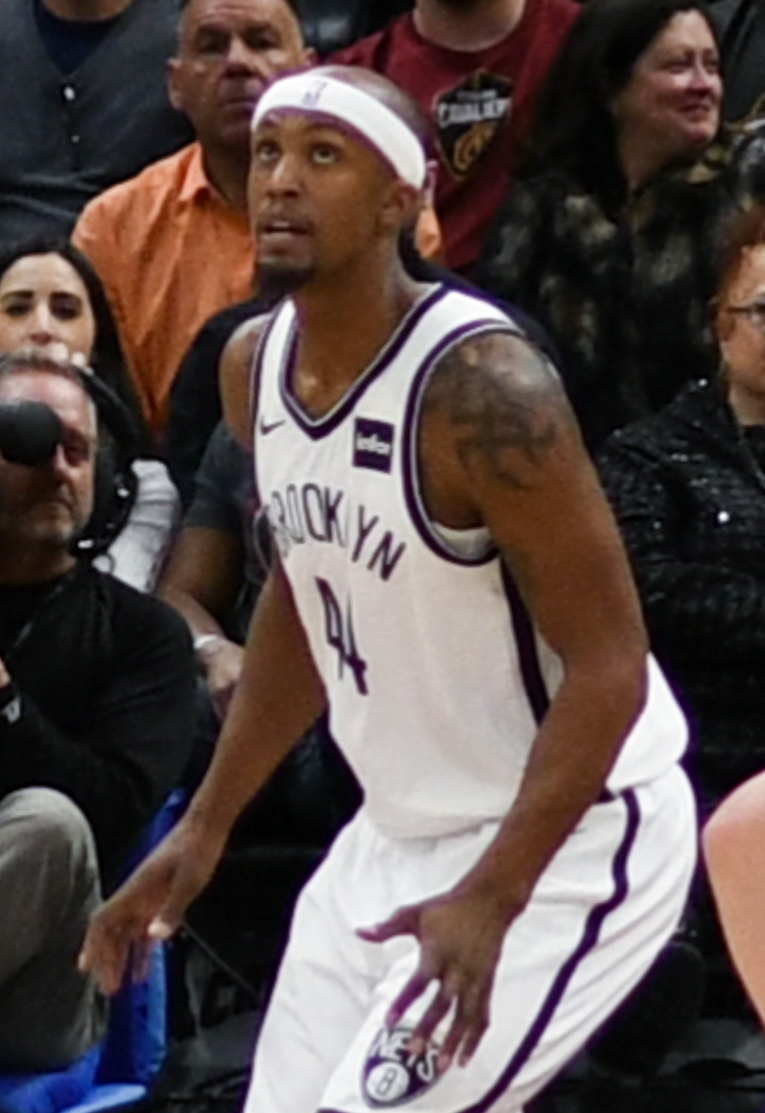 Rodney Hood